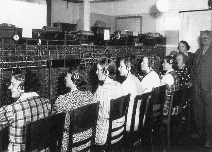 Huddinges telefonstation på 1930-talet låg mellan 1917 och 1942 i torpet Nyboda